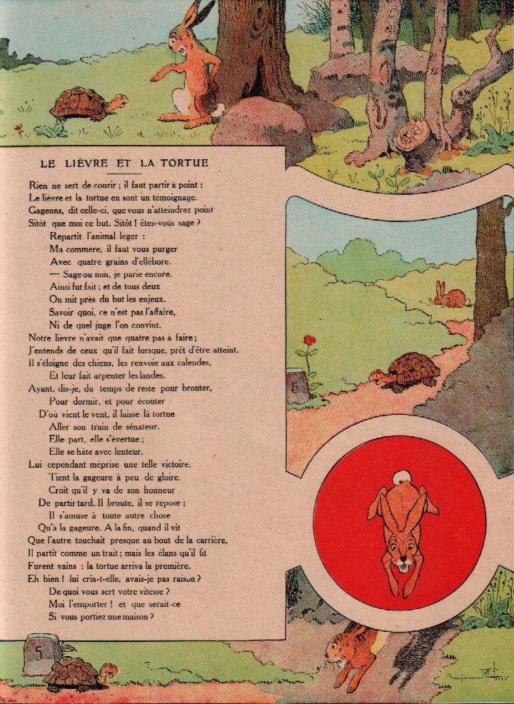 La Fontaine, Le lièvre et la tortue, illustration Benjamin Rabier, 1906. Scan d'un album de famille.